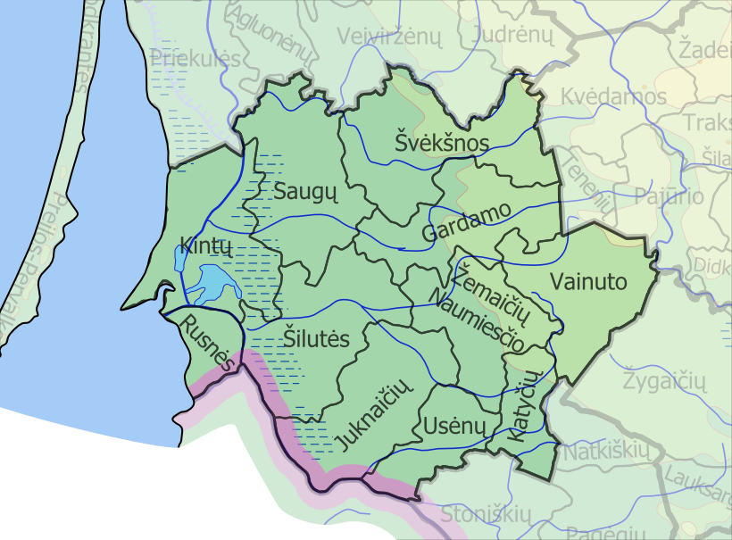 Padaryta iš :image:LietuvosSeniunijos.png